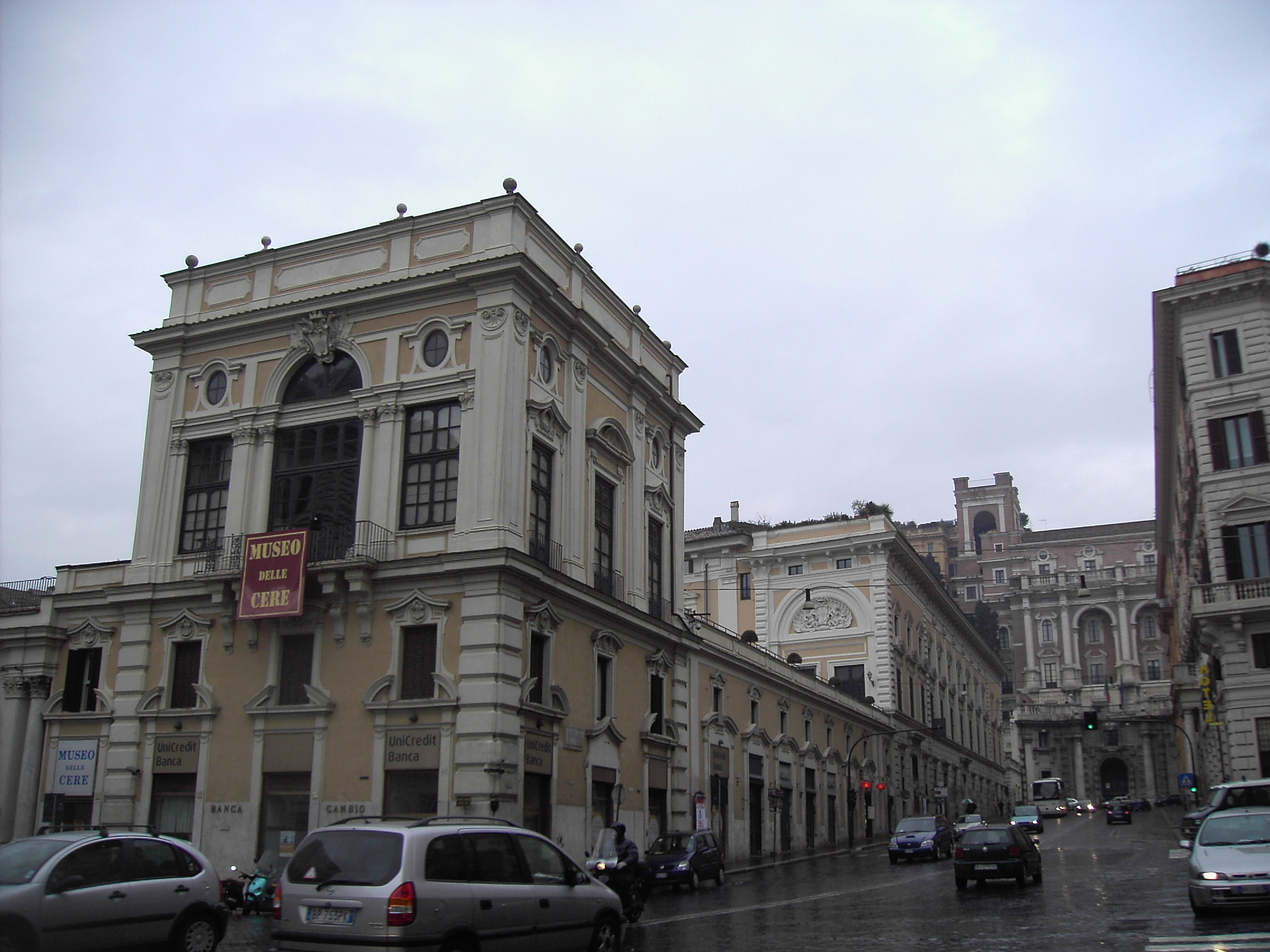 Roma, palazzo Colonna lato via IV Novembre